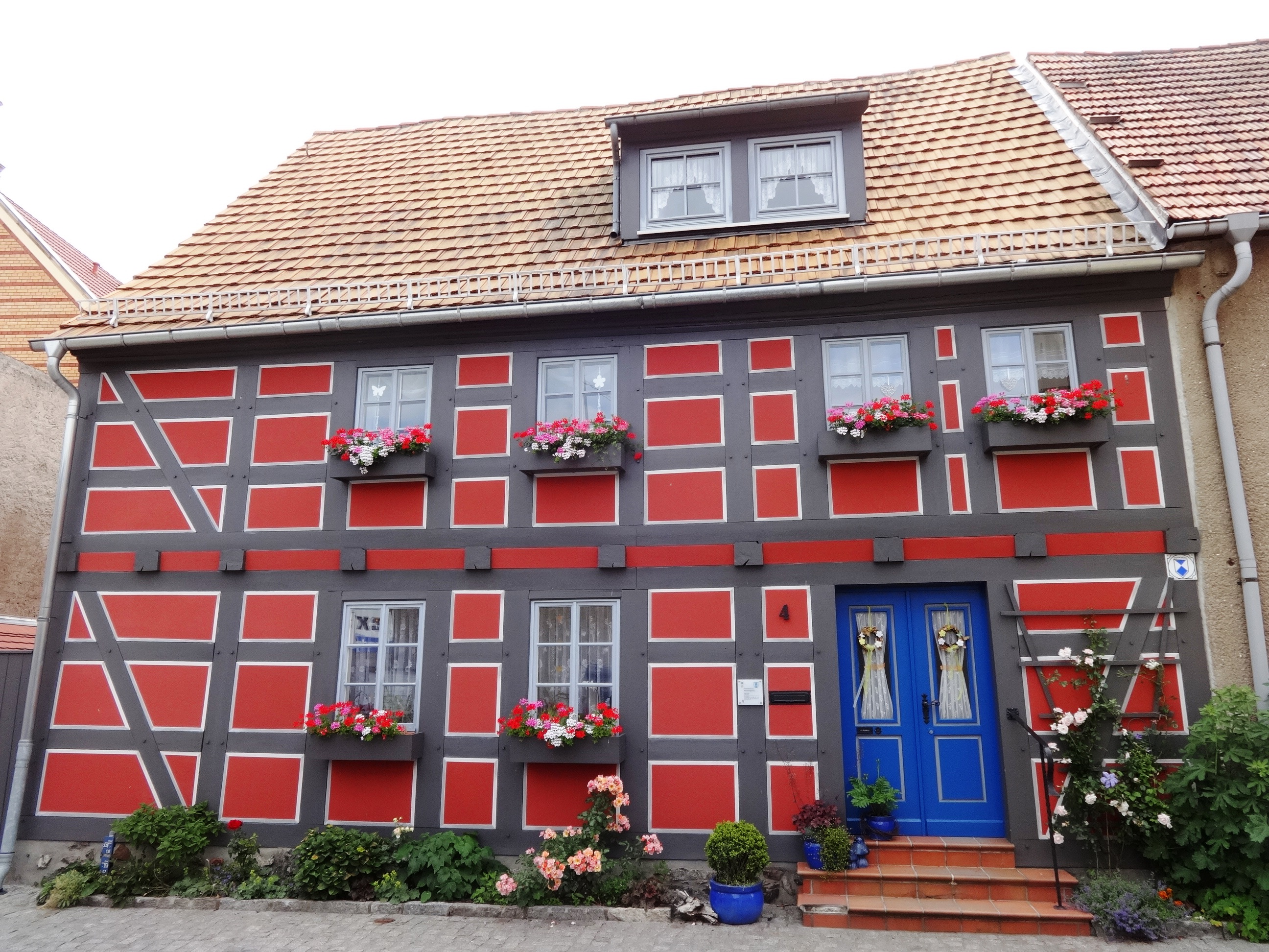 Das Bauwerk entstand um 1800 und ist eines der wenigen erhaltenen Gebäude mit einer ursprünglichen Bausubstanz.